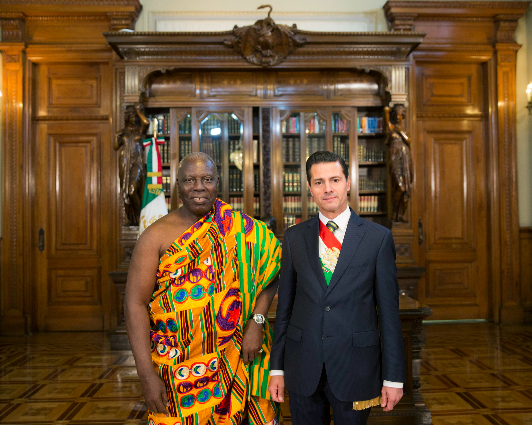 El Presidente Enrique Peña Nieto recibió las cartas credenciales de nuevos Embajadores que iniciaron así sus actividades oficiales como representantes de sus países en México.